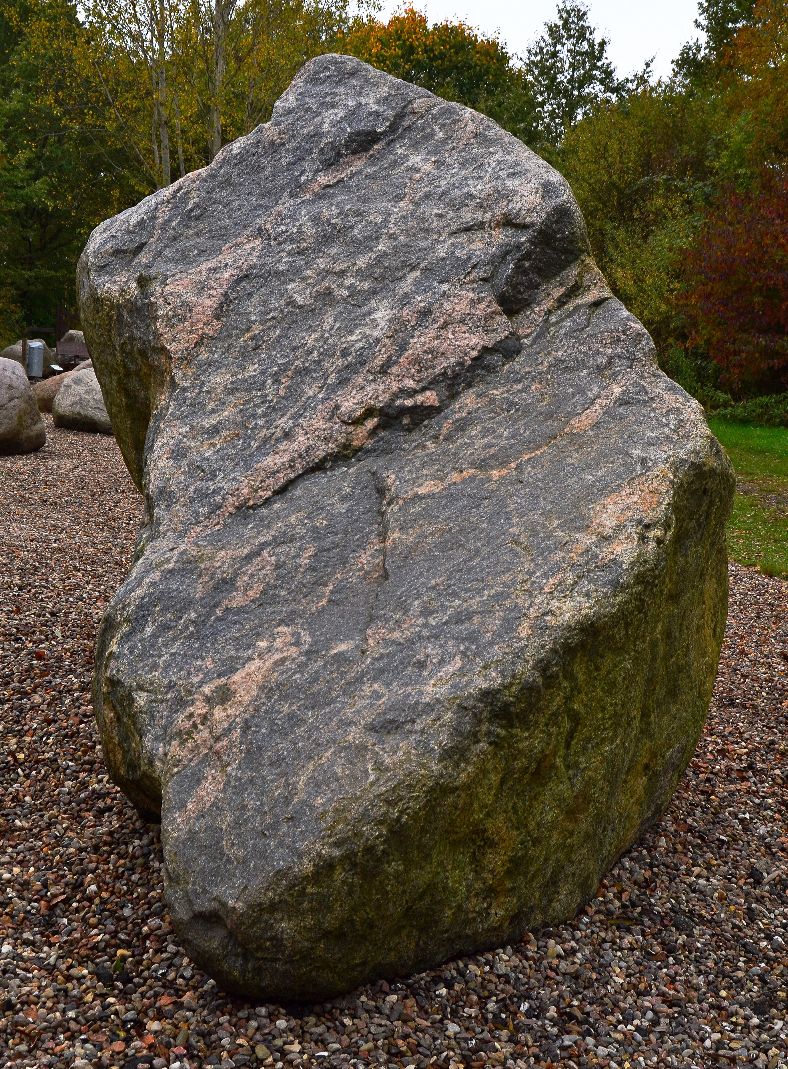 Migmatit Findling Herkunft: Unbekannt, vermutlich Ostschweden, Südfinnland oder angrenzende Seegebiete Alter: Etwa 1,8 Milliarden Jahre Fundort: Lägerdorf Gewicht 11 Tommen